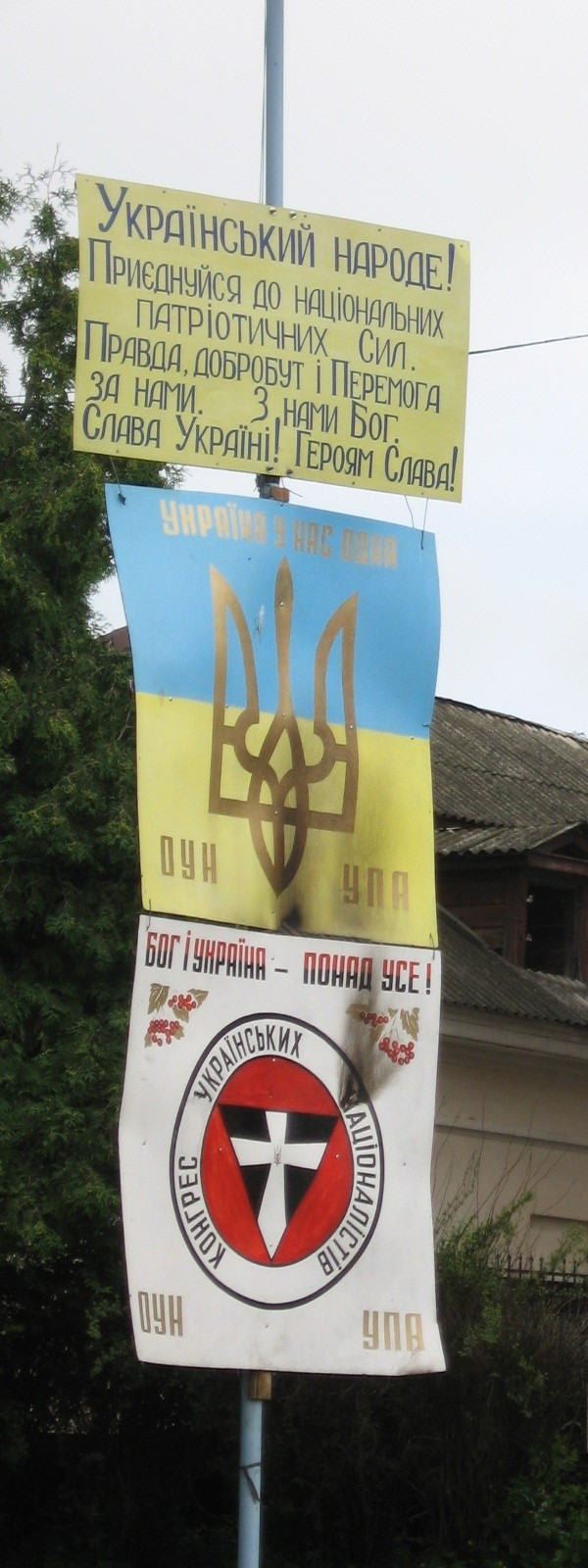 Cedule ukrajinských nacionalistů v Počajevě.